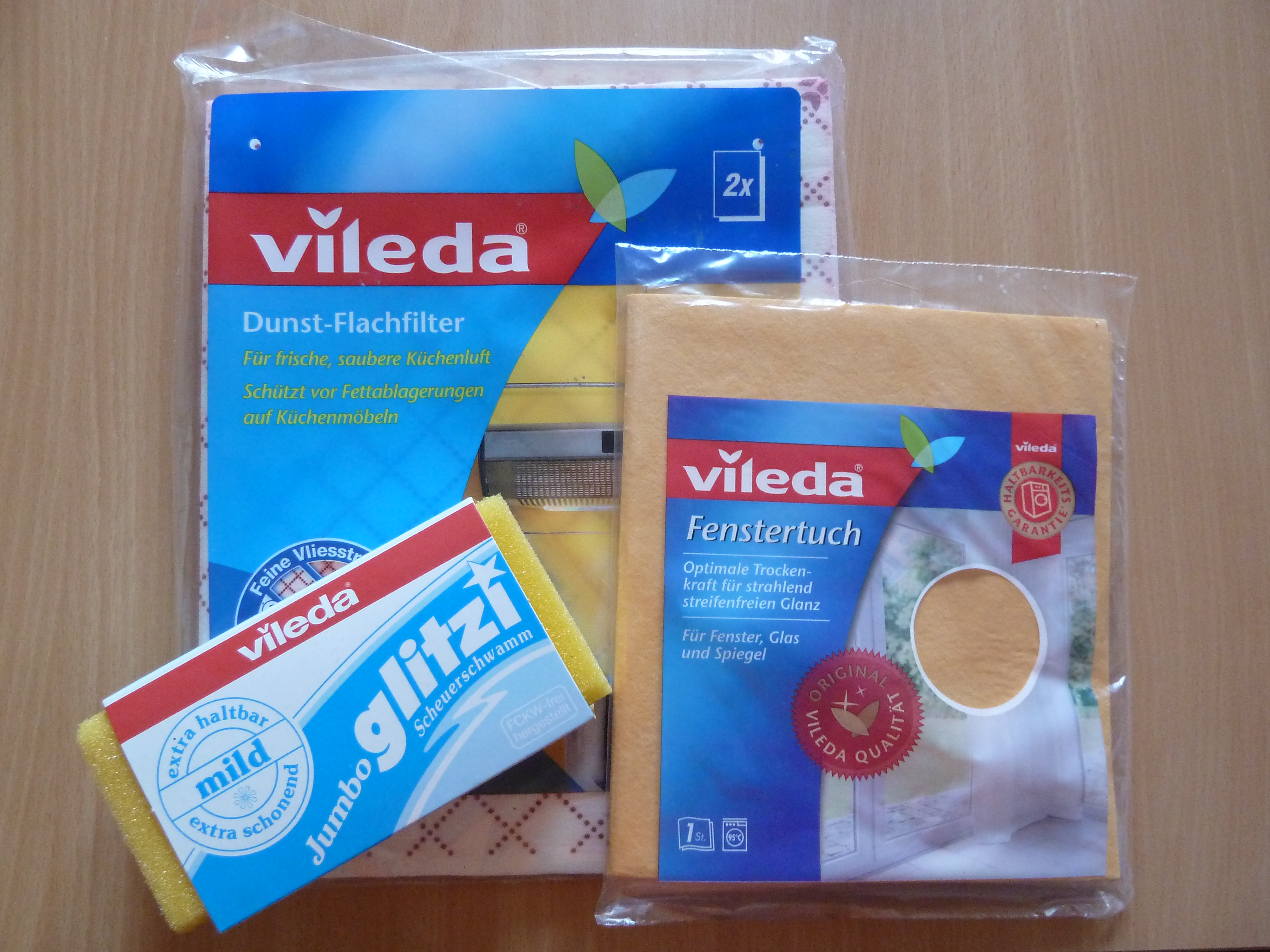 Mehrere Produkte von Vileda